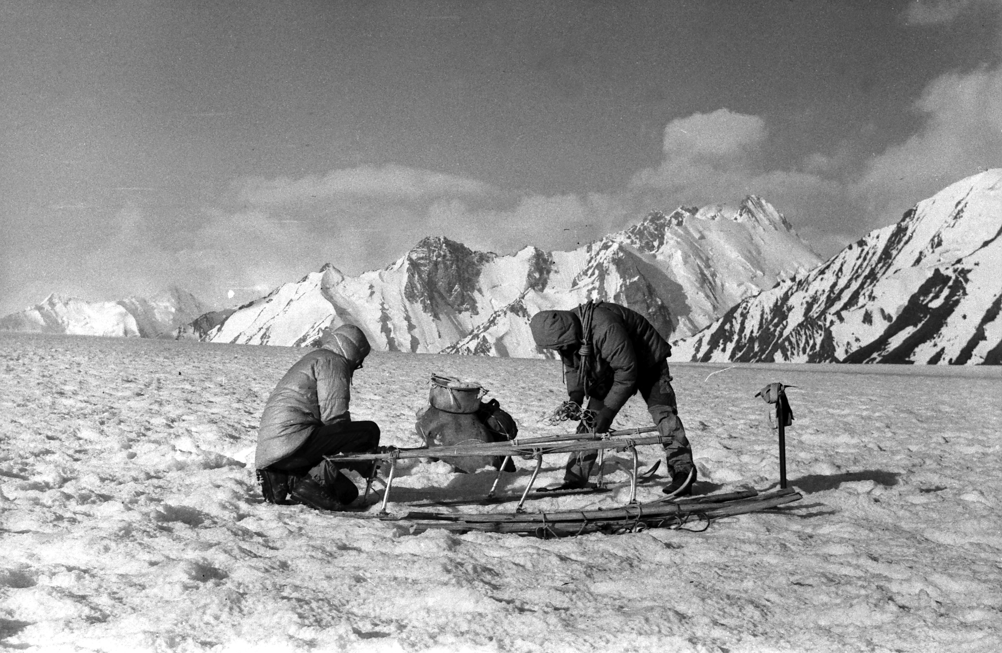 Ekspeditsioon mäetipule "Tartu Ülikool 350".